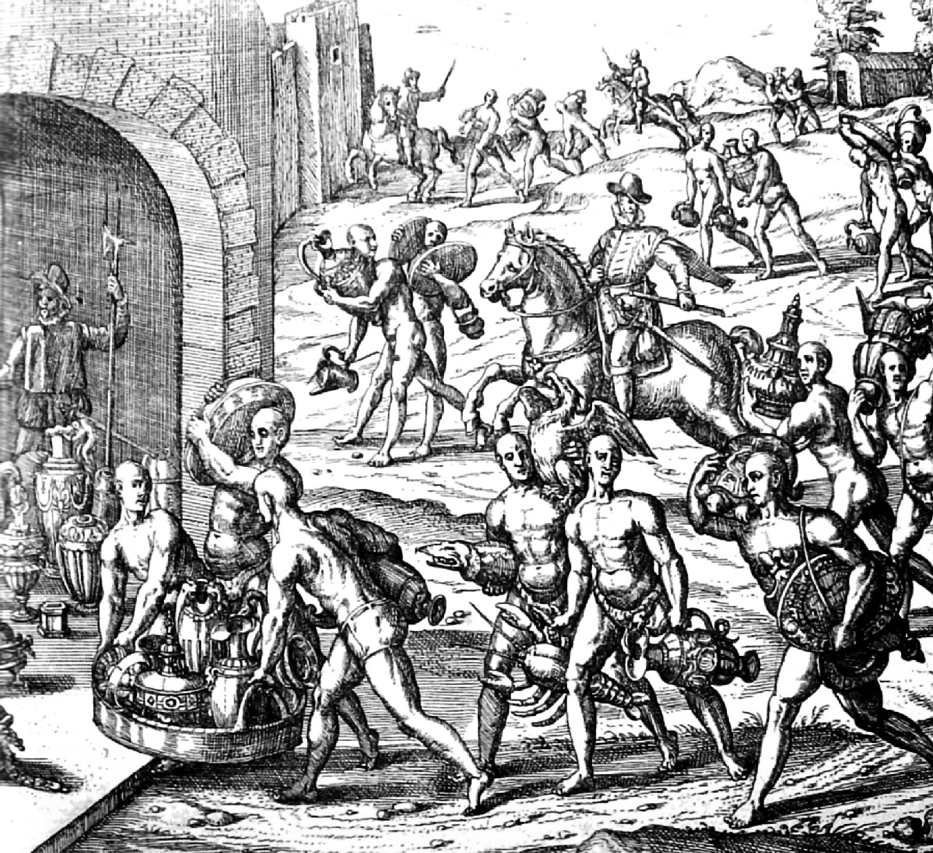 Grabado de Theodor de Bry, siglo XVI, que representa el acarreo de oro y plata para el rescate del inca Atahualpa en Cajamarca.